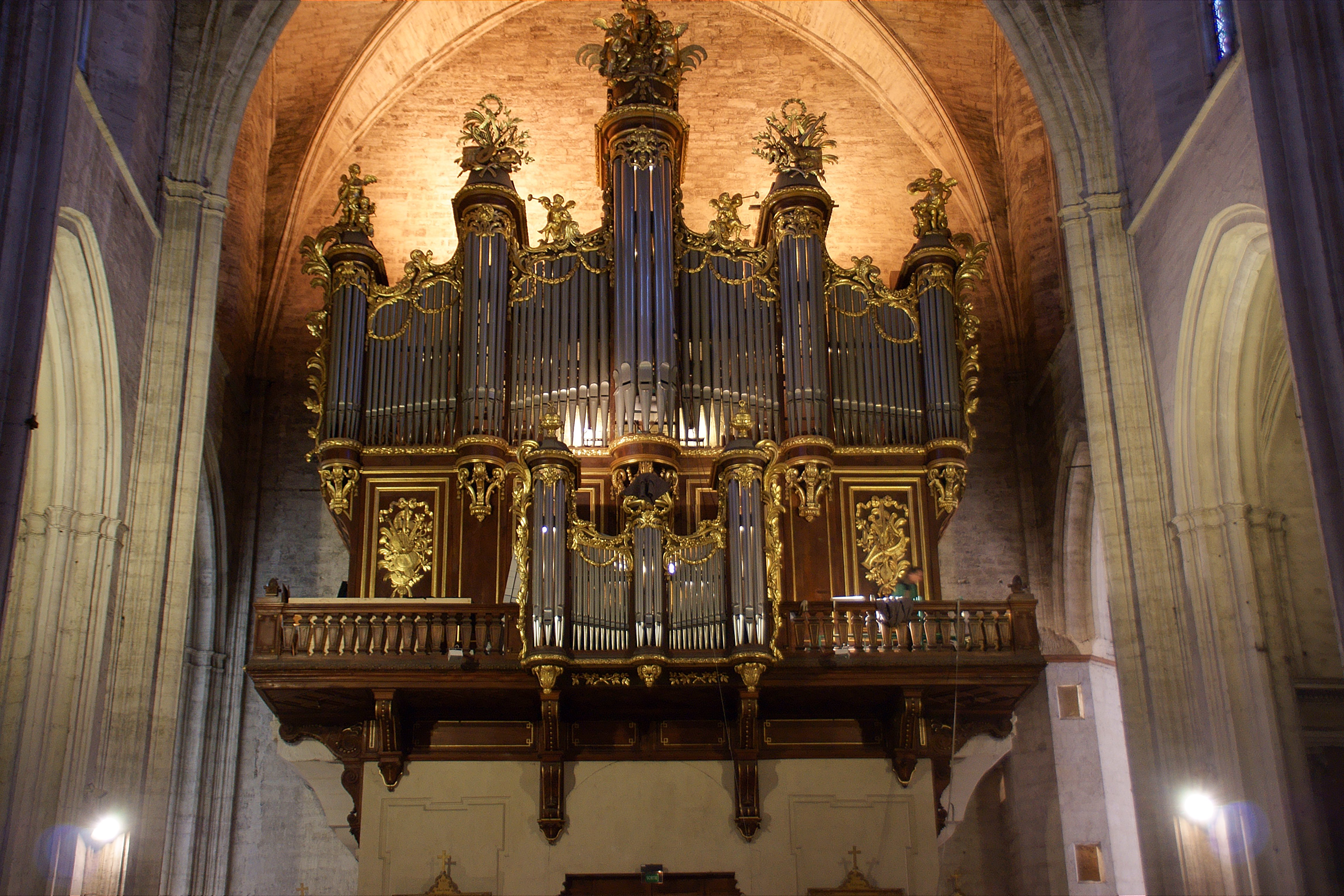 L'orgue Lépine de la cathédrale St-Pierre de Montpellier